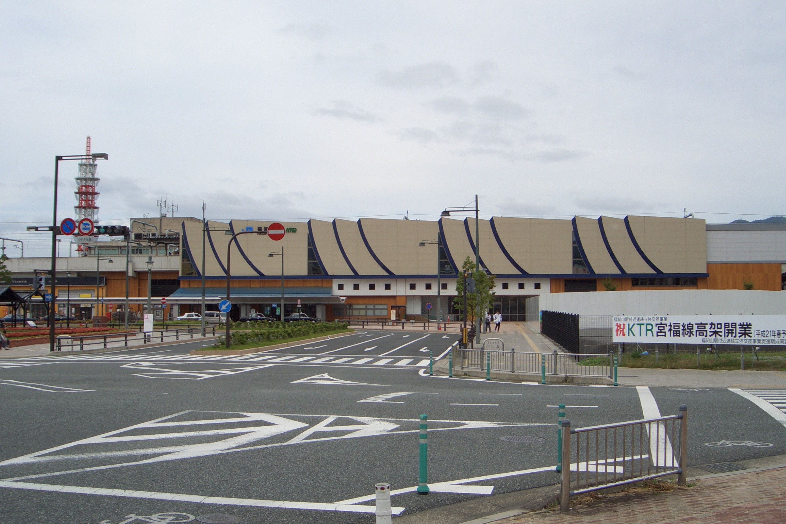 西日本旅客鉄道福知山線山陰本線福知山駅、北近畿タンゴ鉄道宮福線福知山駅 南口